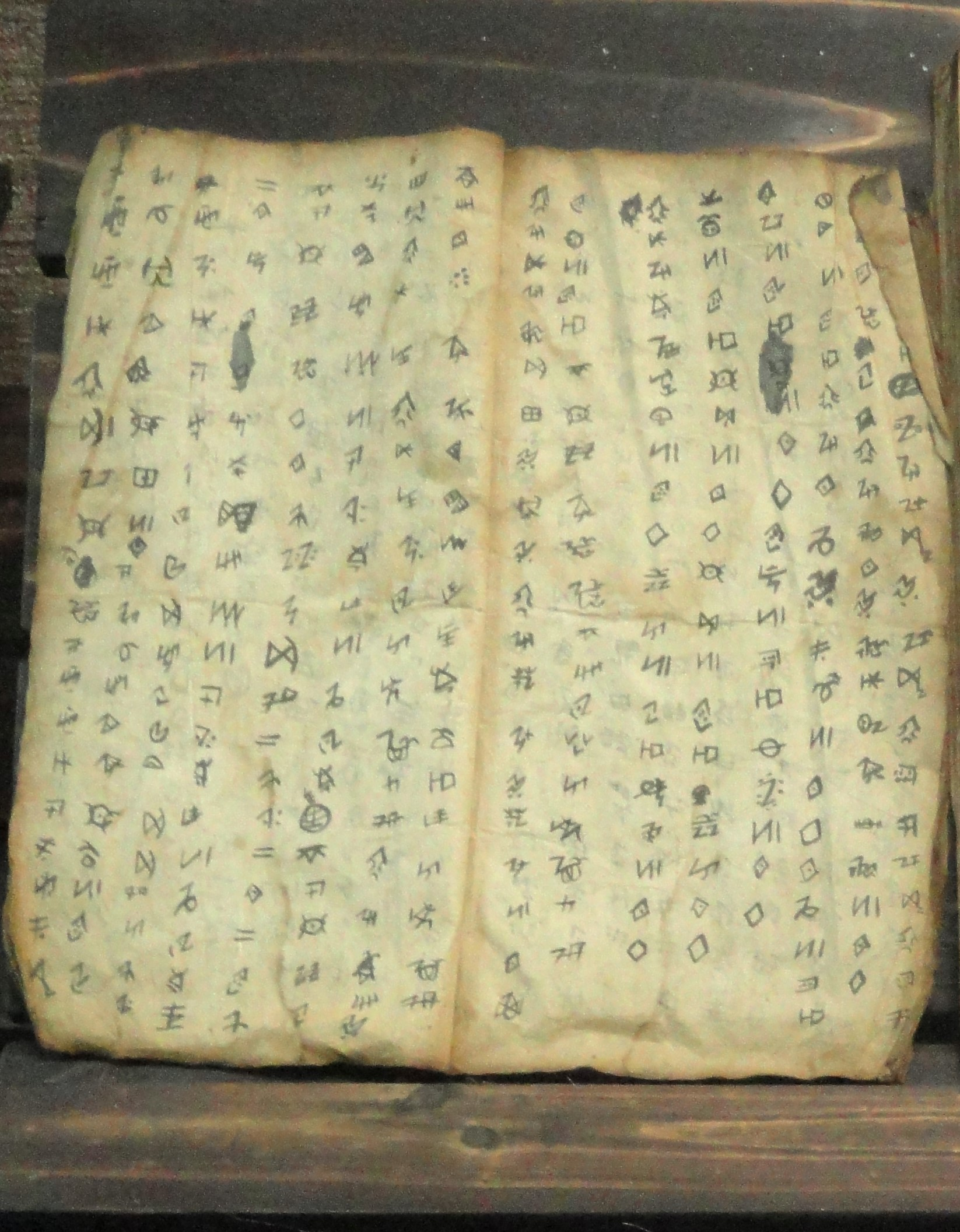 Yi and Yao manuscripts. Manuscripts / writing systems in the Yunnan Nationalities Museum, Kunming, Yunnan, China. 石林撒尼彝文典籍《阿诗玛》特写